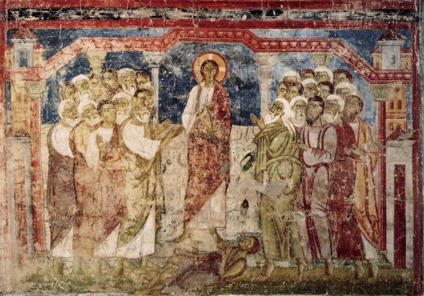 Romanisches Fresko im ehemaligen Läuthaus des Stiftes Lambach: Christus heilt in der Synagoge von Capernaum einen Besessenen. Zwei Männergruppen betrachten das Geschehen, die zwölf Personen links sind wahrscheinlich die zwölf Apostel.